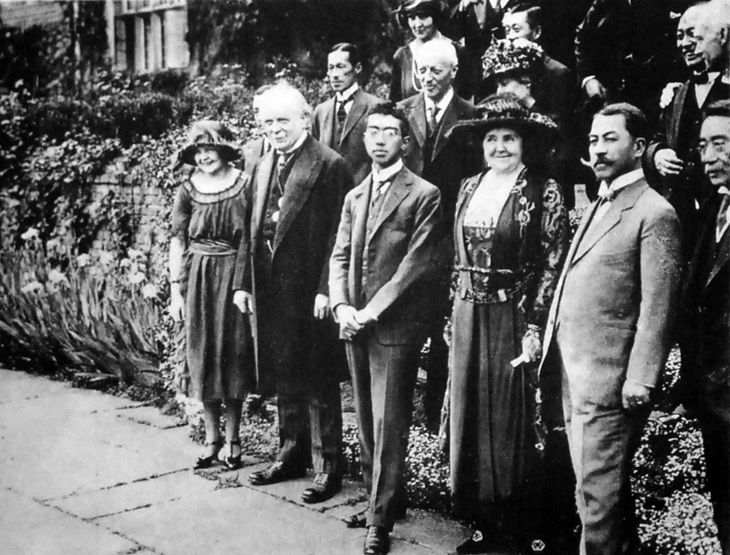 ロンドン近郊のクロウフォードで、英国首相ロイド・ジョージ(Lloyd George)らと会う皇太子裕仁親王(Michi-no-miya Hirohito/Emperor Shōwa)。